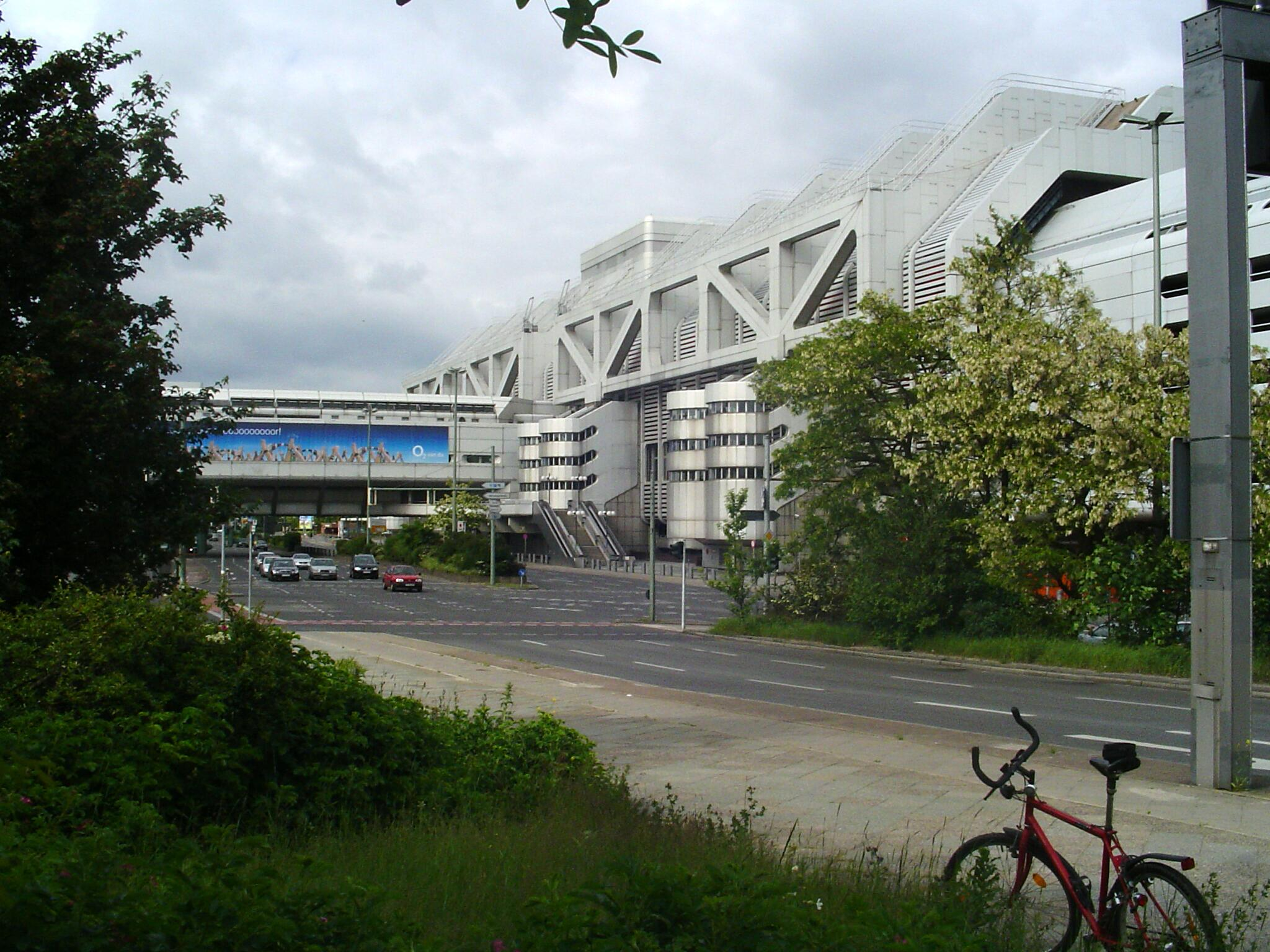 ICC Berlin, von Südwesten gesehen